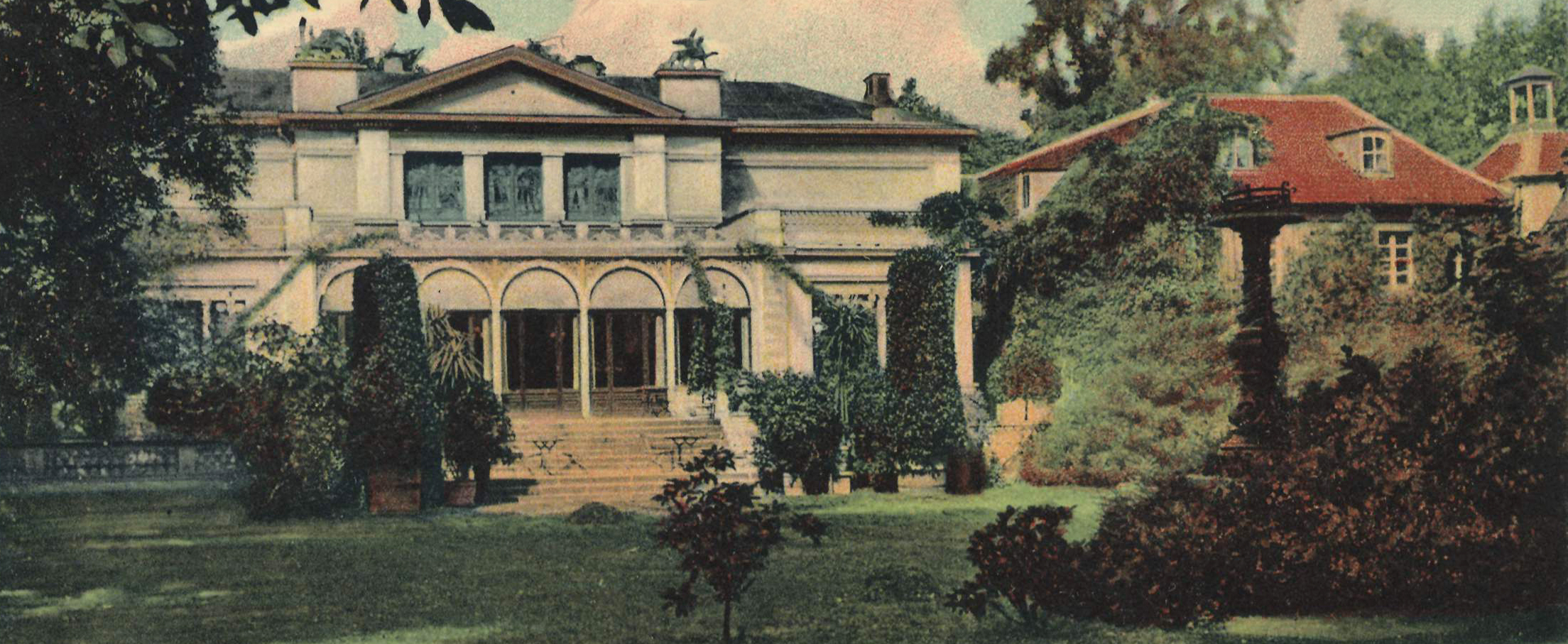 Malkasten Düsseldorf, Postkarte, 1904 (Ausschnitt)